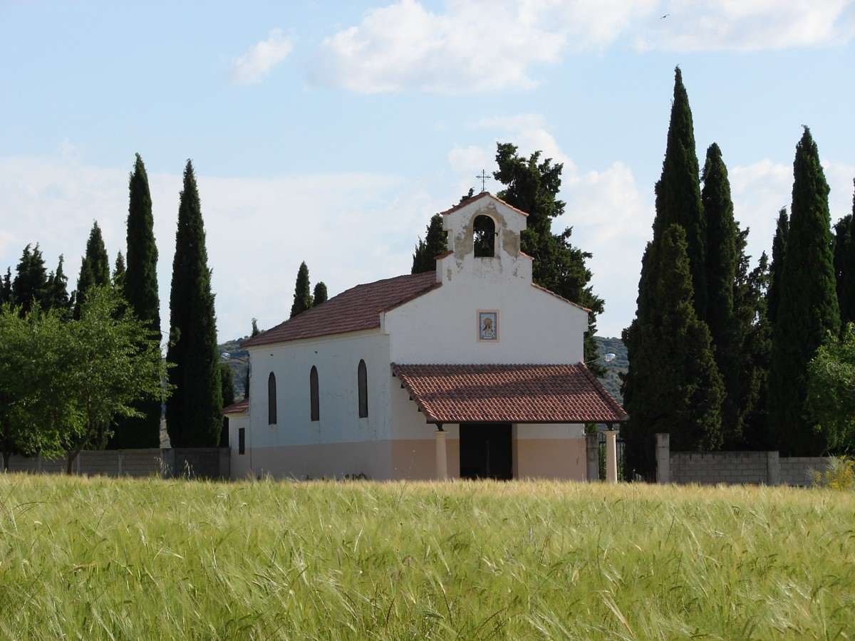 Ermita de Nuestra Señora del Socorro, Patrona de Illana (Guadalajara - España)